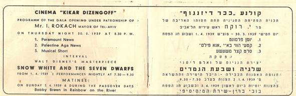 צילום של כרטיס לסרט שלגייה ושבעת הגמדים מ-1939.